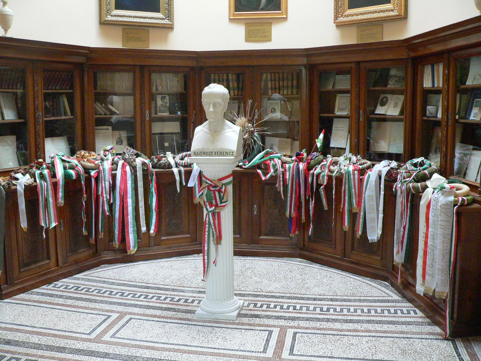 Kazinczy Ferenc mellszobra a Kazinczy Emlékcsarnokban (Ferenczy István és Marschalkó János alkotása)[1]